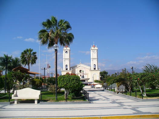 Plaza de armas de Olmos